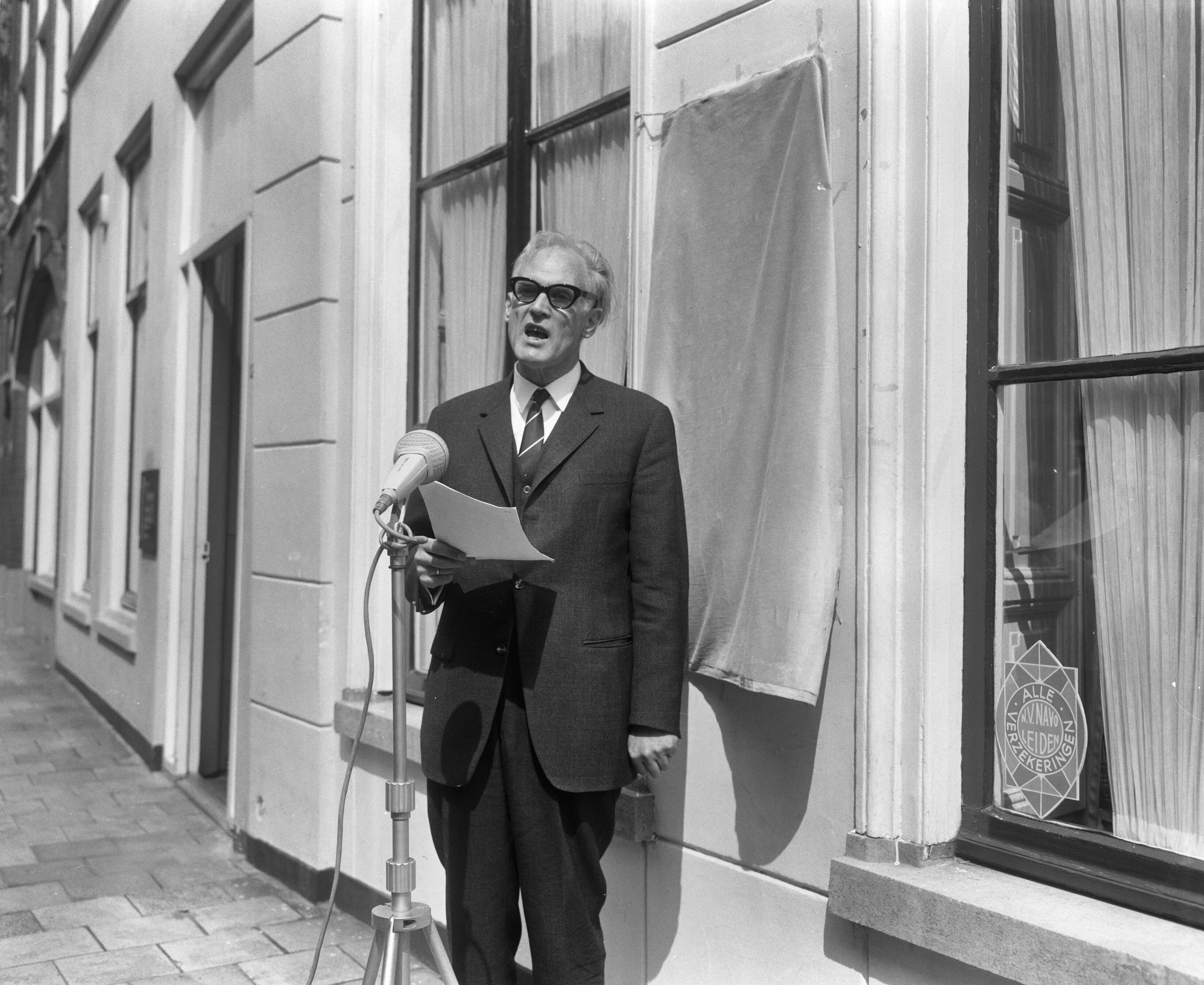 Tweehonderd jarig bestaan Maatschappij der Nederlandse Letterkunde, steen te Leiden (Hogewoerd 126-b) onthuld voor oprichter Frans van Lelyveld. Toespraak van voorzitter prof. dr. K Heeroma. Leiden, Nederland, 18 mei 1966